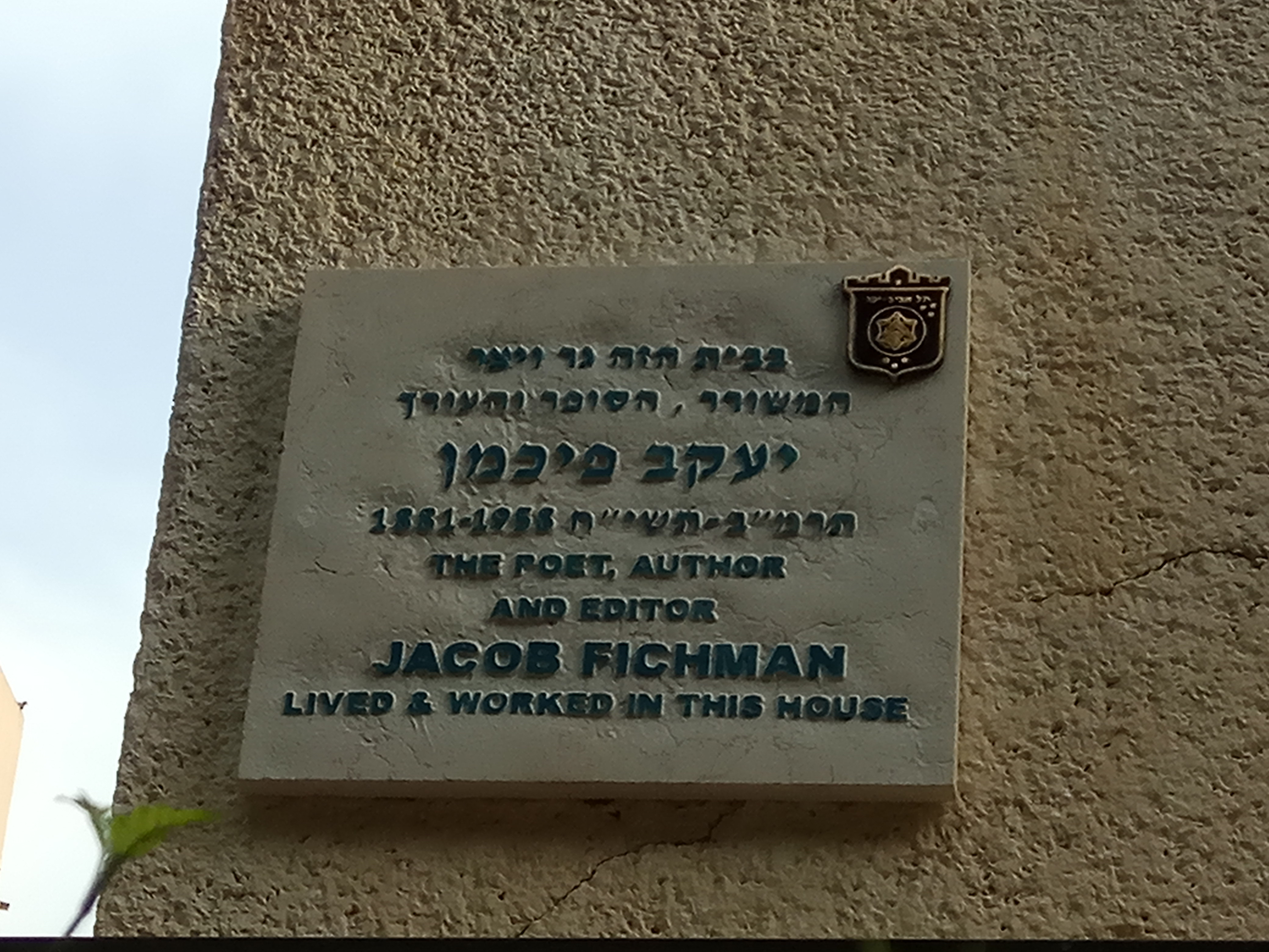 לוחית זיכרון ליעקב פיכמן ברחוב דיזנגוף 32 בתל אביב